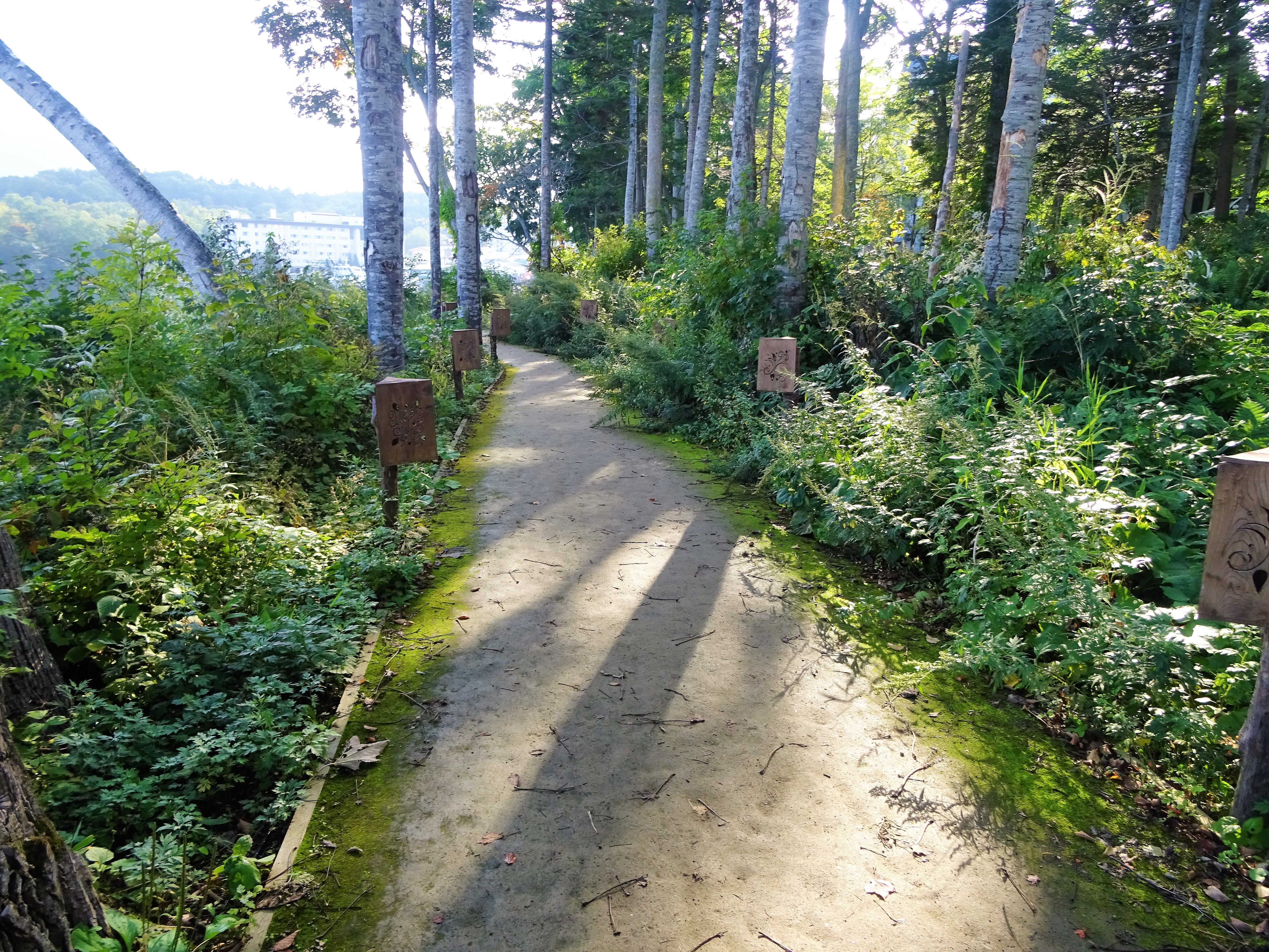 阿寒湖温泉の阿寒湖湖畔の遊歩道